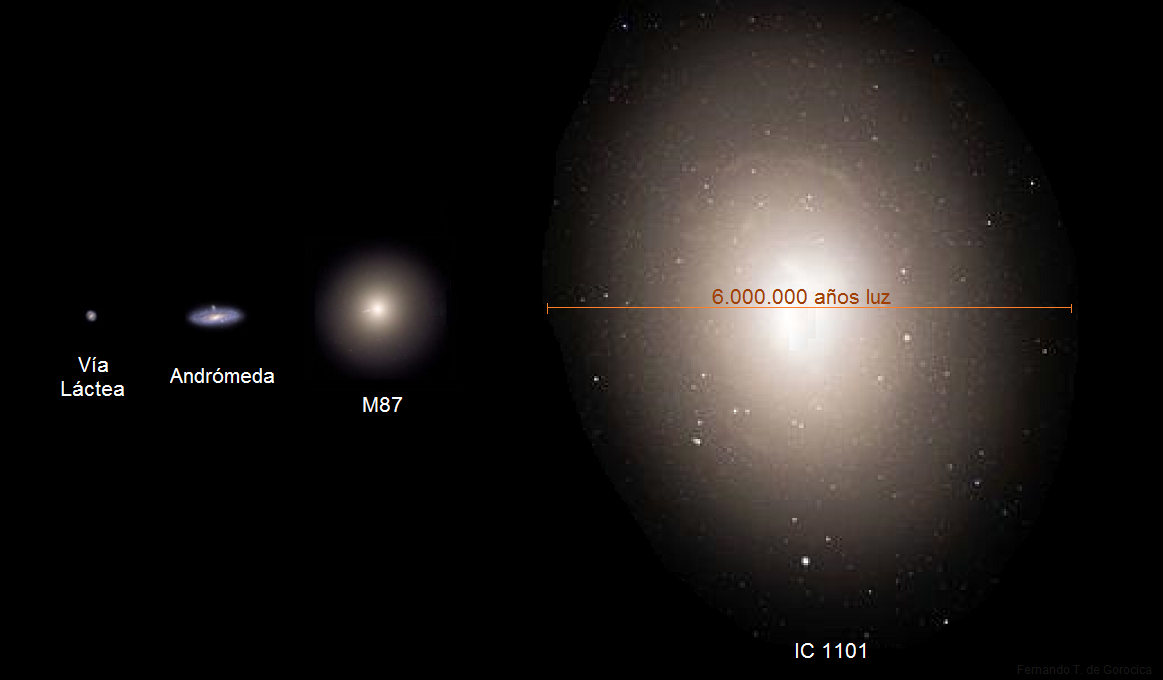 IC 1101. GALAXIA SUPERGIGANTE. Es la denominada IC 1101 (Index Catalogue 1101) del grupo galáctico Abell 2029. Está a 1.070 millones de años luz del Sistema Solar y ubicada en la constelación de Sepens (Caput o “muerta”) y a 7° 36‘ (SW) de Delta Serpens o Tsin. Tiene una magnitud aparente de +14,7 y su tamaño en el cielo nocturno es de 1,02’ x 6,6’ de arco de grado. Es una galaxia del tipo elíptica como la M87, posee 2.500 millones de masas solares, con 100 billones de estrellas alrededor de su núcleo. Es 25 veces más grande que nuestra vecina del grupo local, la galáxia de Andrómeda. La IC 1101 fue descubierta el 19.06.1790 por Frederick William Herschel, astrofísico y astrónomo británico, nacido en Alemania. Luego de 100 años fue catalogada como la IC 1101 por el astrónomo danés-irlandés John Louis Emil Dreyer.